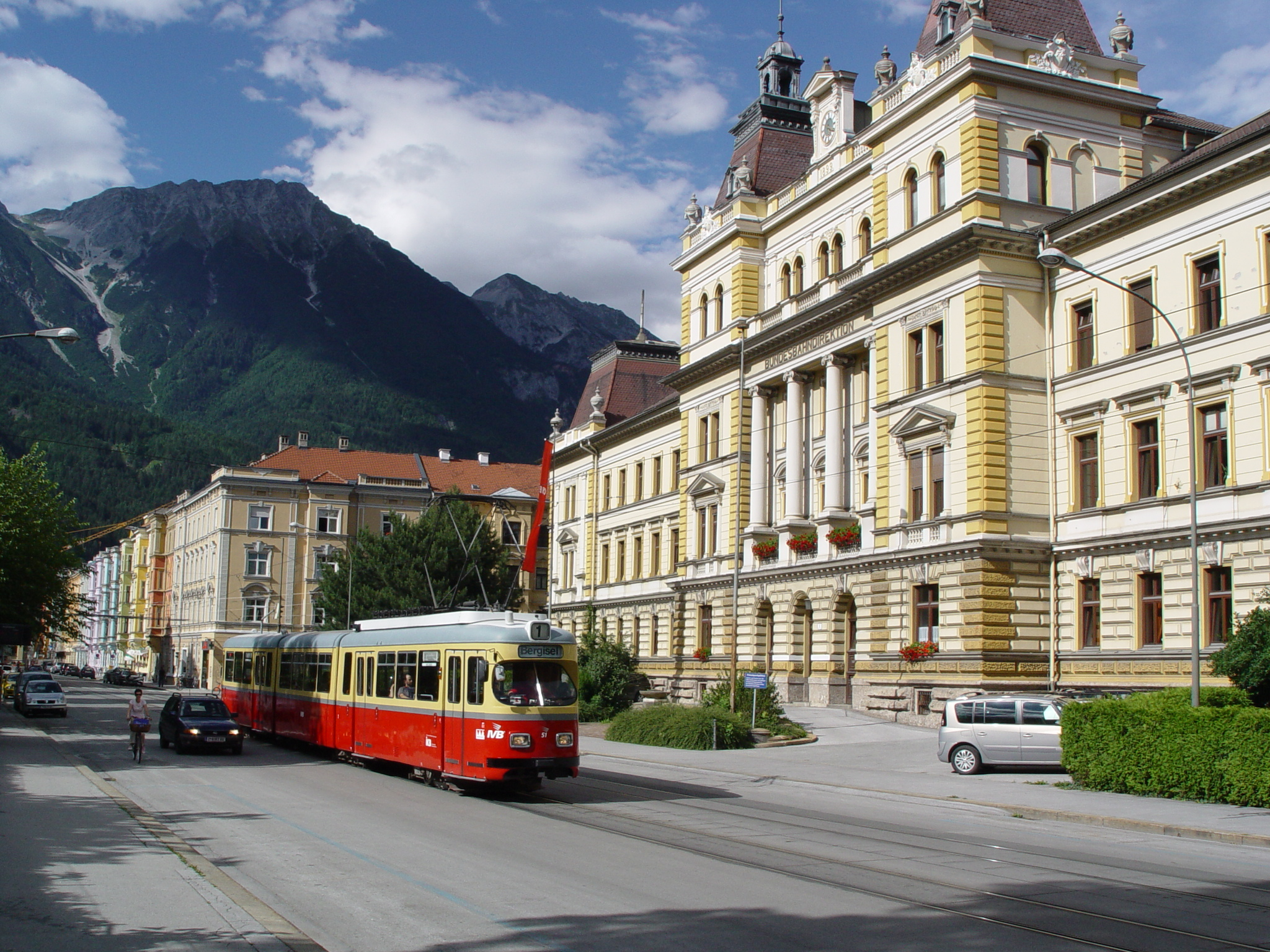 ex-Bielefelder Triebwagen 51 der Innsbrucker Verkehrsbetriebe im Saggen